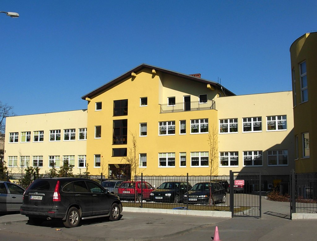 Szkoła katolicka - pomnik Jana Pawła II w Bydgsozczy